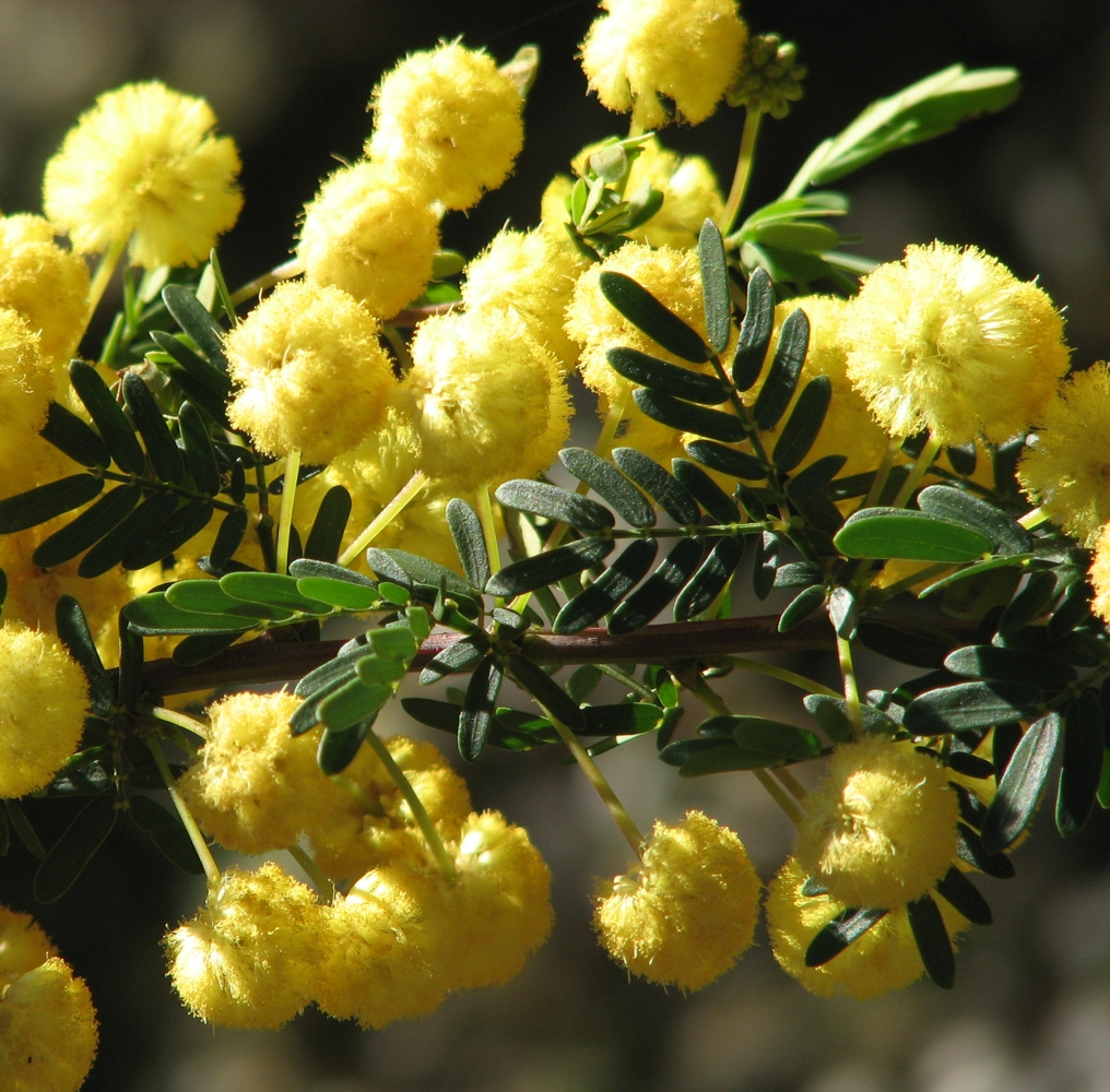 Acacia nigricans, Maranoa Gardens, Balwyn, Victoria, Australia